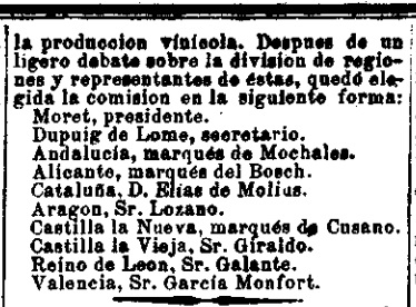 Composición de la Comisión de diputados creada para cuestiones vinícolas en España en mayo de 1891